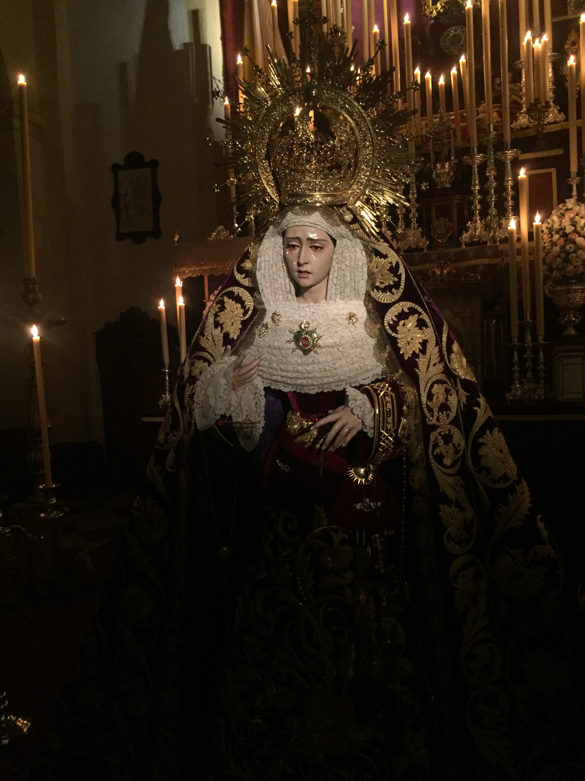 mayor dolor granada